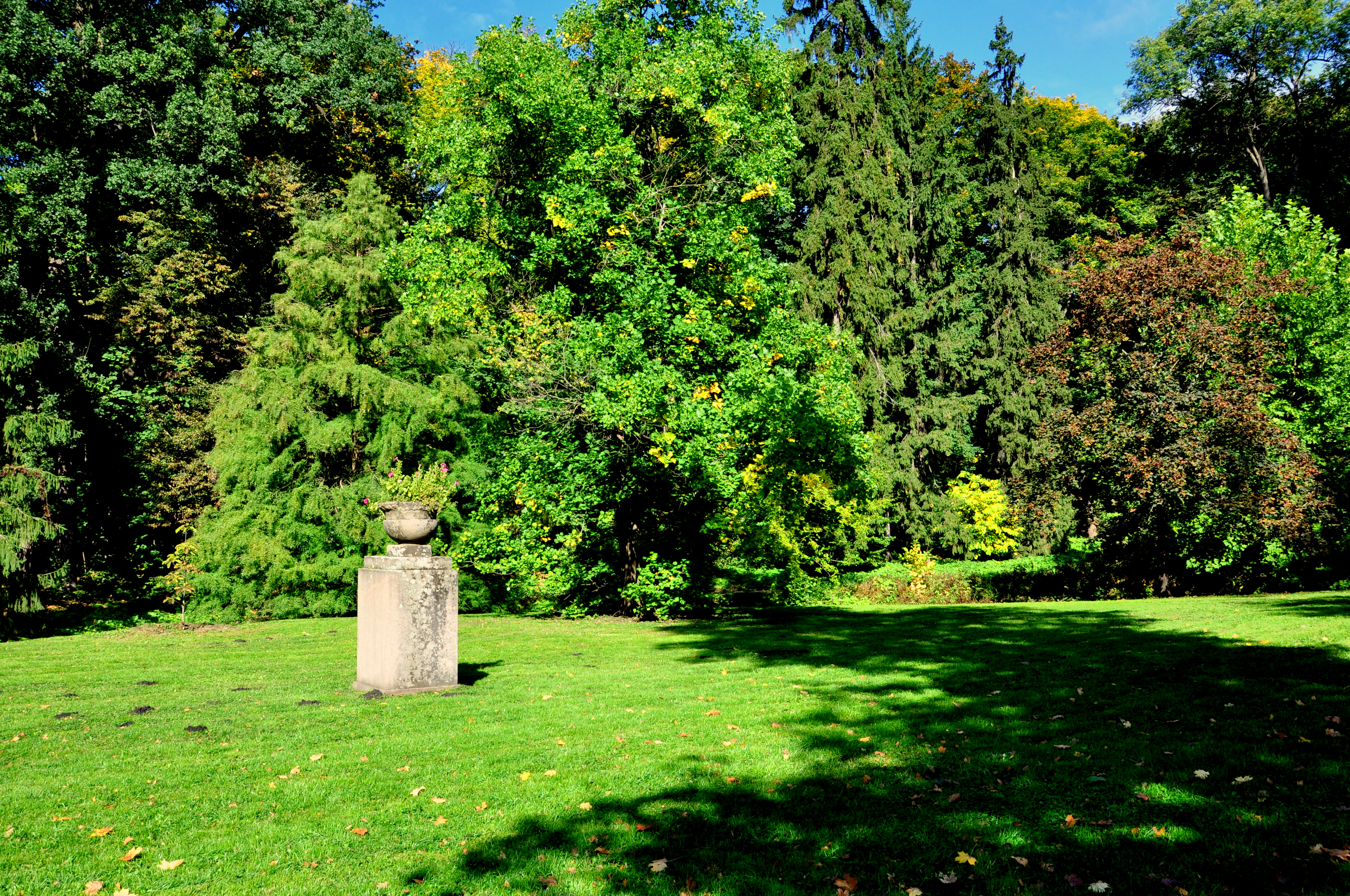 4. Ділянка Єлисейських полів, Умань, вул. Садова, 55 (парк «Софіївка»)